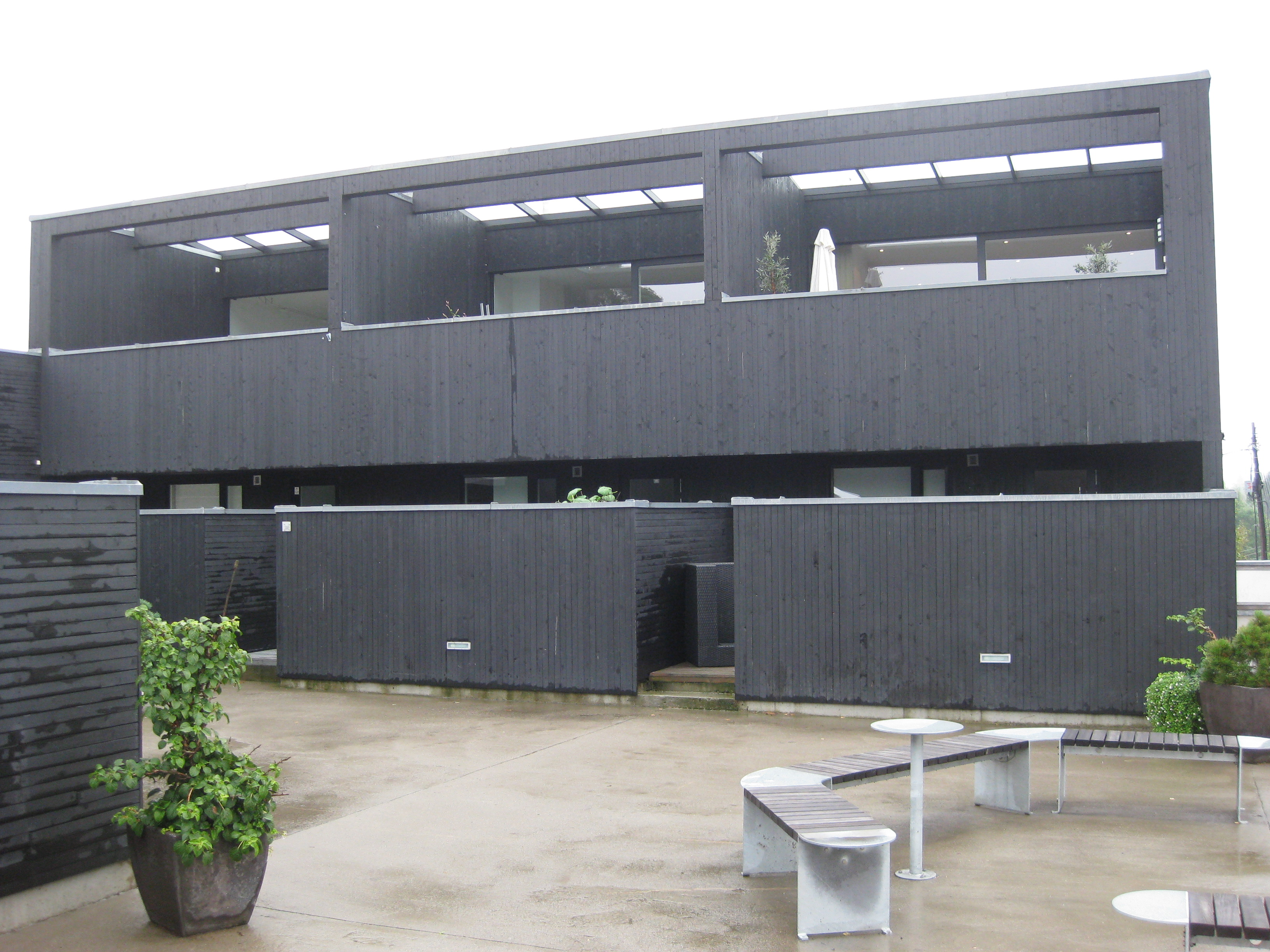 Rekkehus i Bjørnveien 119, Oslo. Arkitekt Dahle/Dahle/Breitenstein AS. Sundts premie 2006.